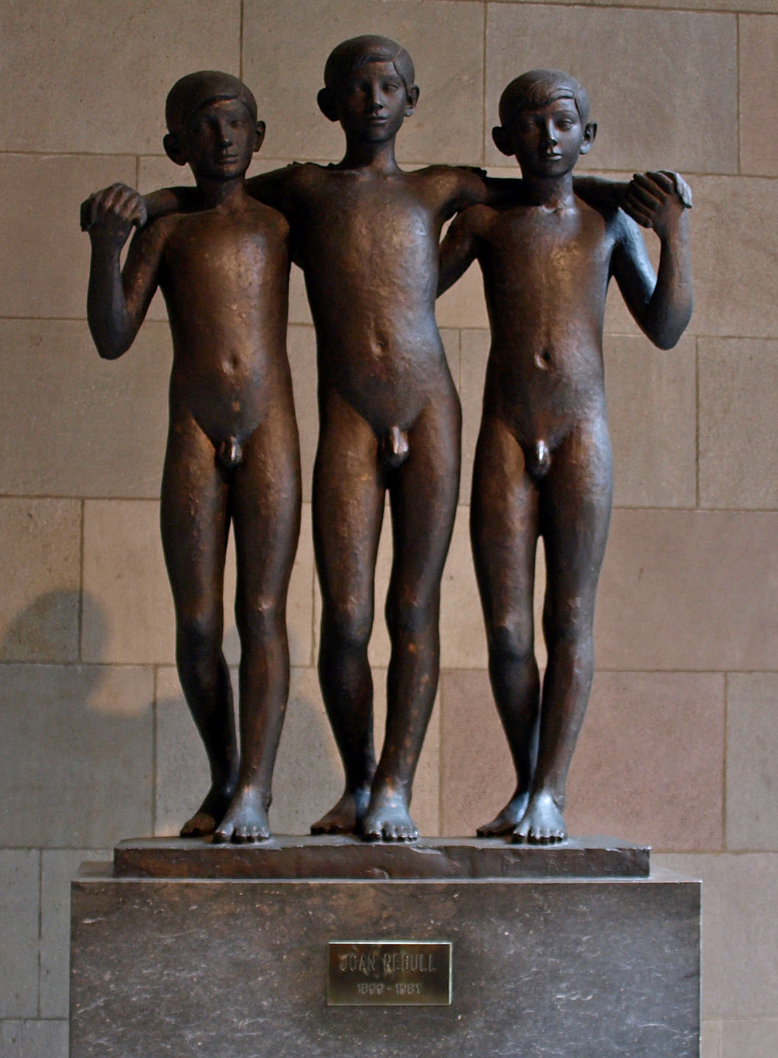 Els tres gitanets (Joan Rebull, 1899 - 1981)